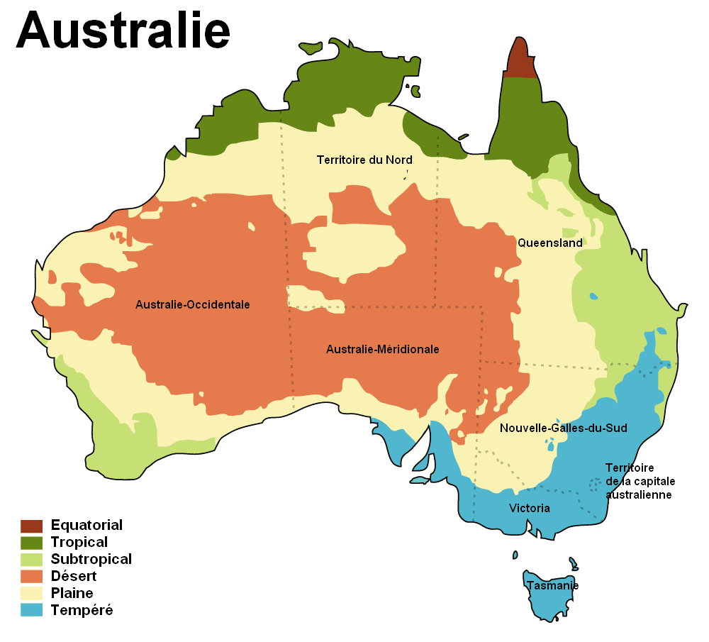 traduction d'une carte des zones de climat en Australie du wiki anglais